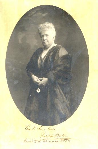 S.A.R. La Infanta Isabel de Bourbon e Bourbon (1851–1931)